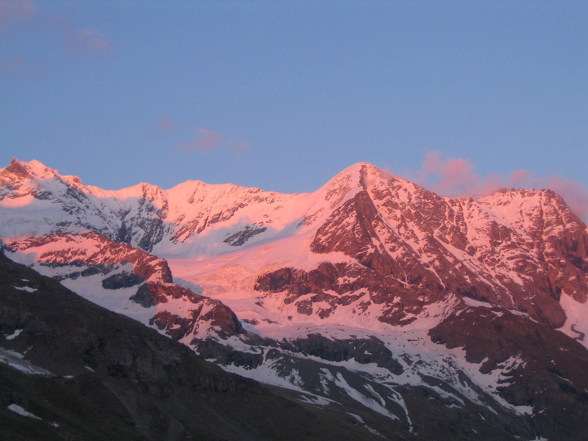 Couché de soleil sur le dôme des platières à droite et le dôme de la sache. En montant au refuge du mont pourri Juin 2006. Licensing Catégorie:Sommet des Alpes françaises Catégorie:Massif de la Vanoise catégorie:montagne